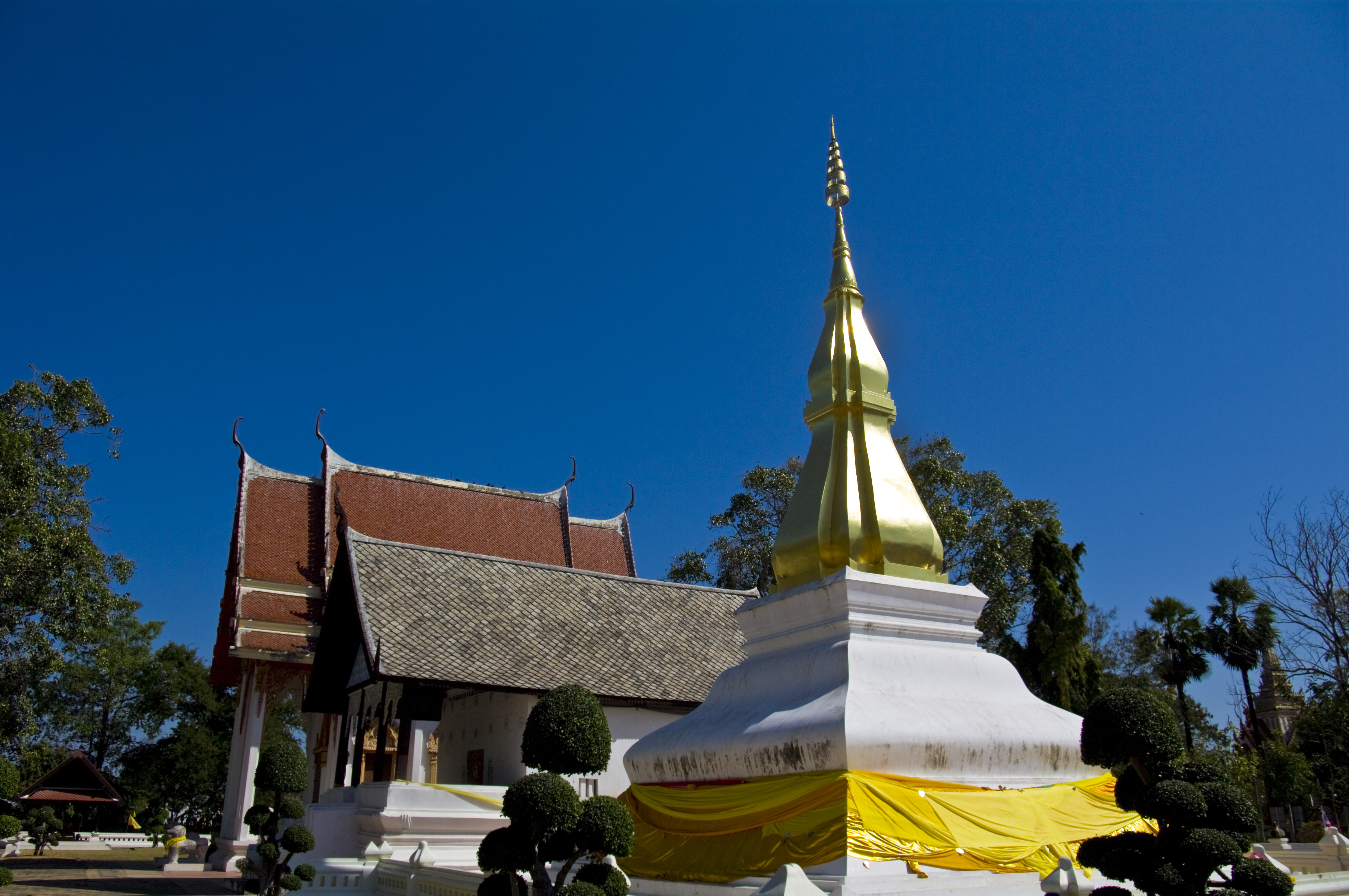 พระธาตุขามแก่น(วัดเจติยภูมิ)